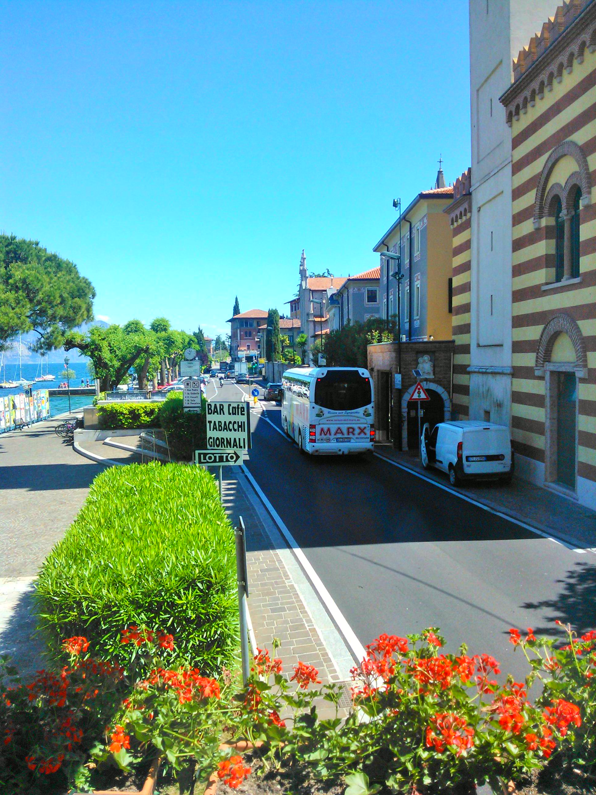 Lungo tutta la parte destra dell'immagine si nota uno scorcio di Casa Madre delle Piccole Suore della Sacra Famiglia in Castelletto di Brenzone sul Garda.